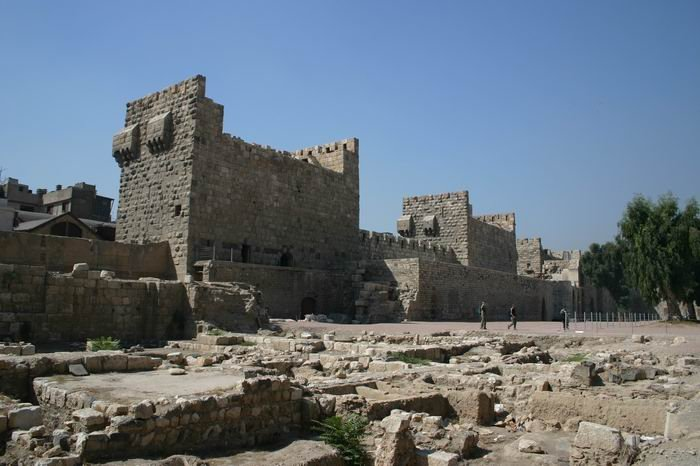 Zitadelle von Damaskus, eigenes Foto von 09/2006, public domain